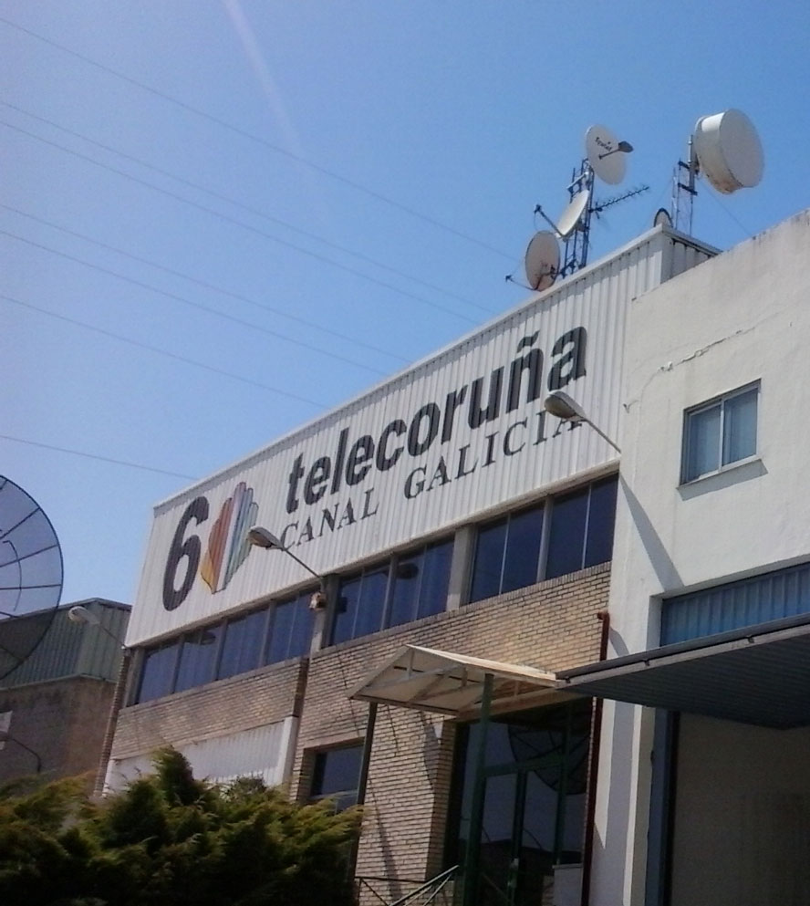 Microondas de Egatel en Telecoruña Pocomaco